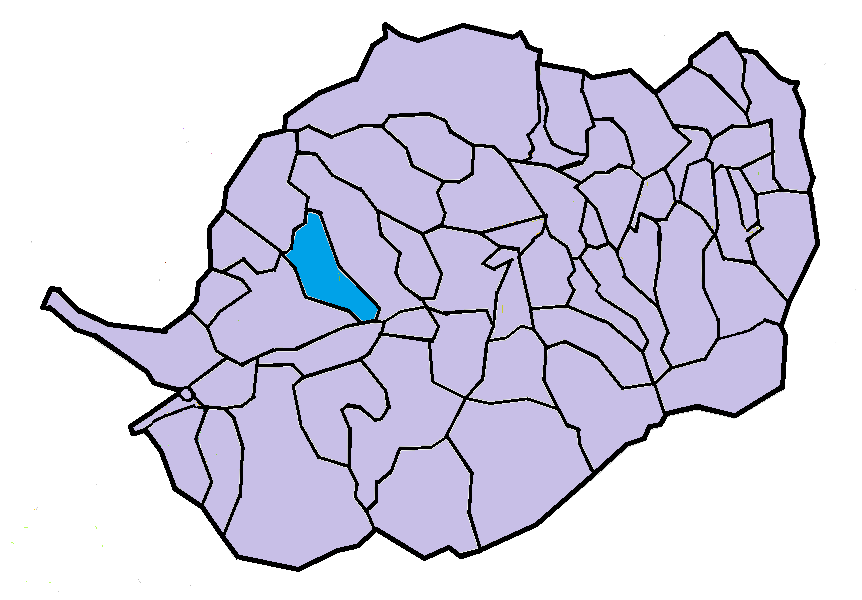 Orellà en el Conflent, a partir del mapa municipal del Conflent de lliure disposició adaptat al Nomenclàtor toponímic aprovat el 2007